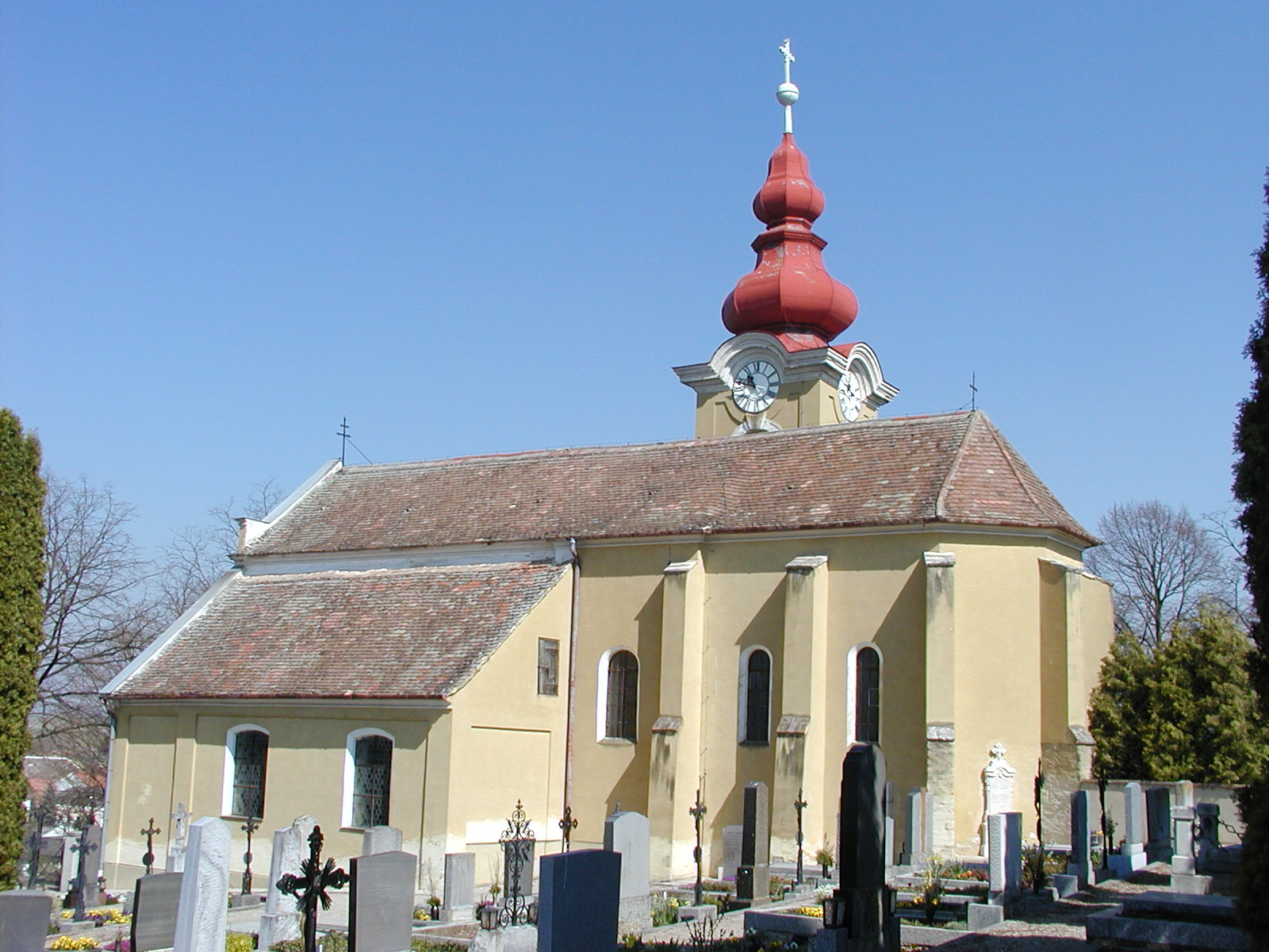 Pfarrkirche hl.Stefan in Frauendorf, Sitzendorf an der Schmida Object location48° 34′ 18.66″ N, 15° 56′ 11.83″ E